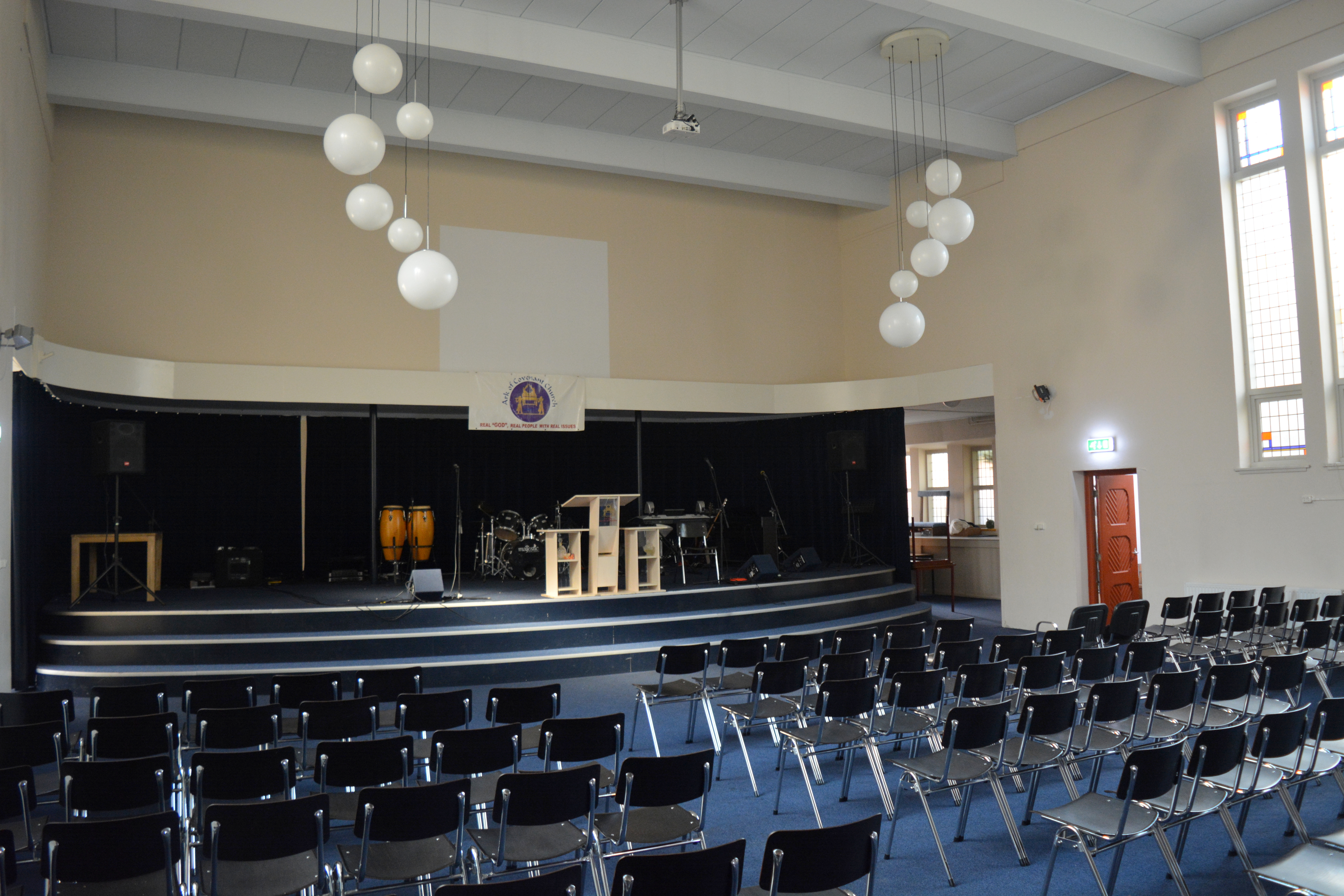 Leeuwarden, interieur kerk van de Messiaanse Gemeente Rehoboth